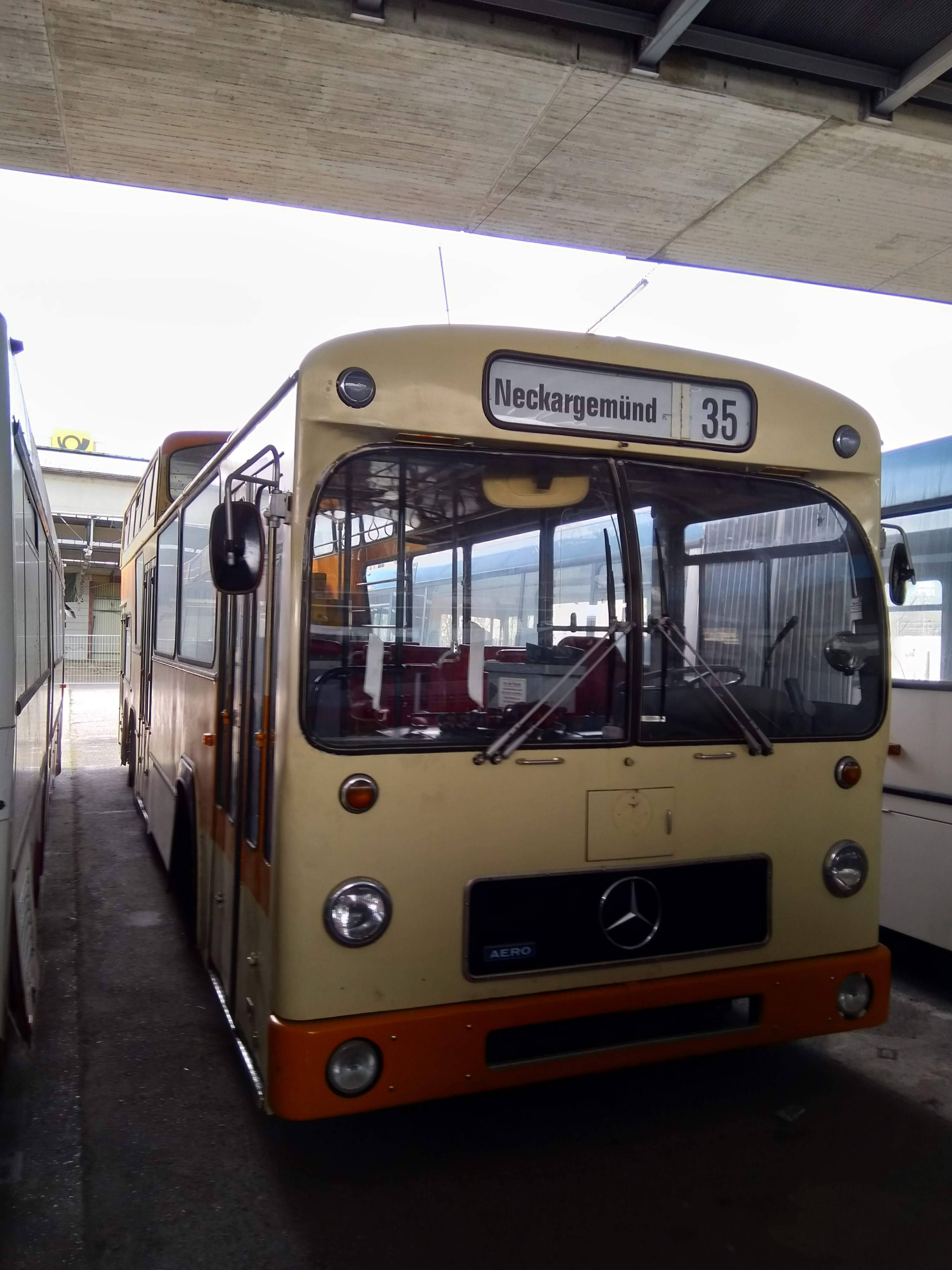 Mercedes-Benz O 305 als Doppelstockbusse